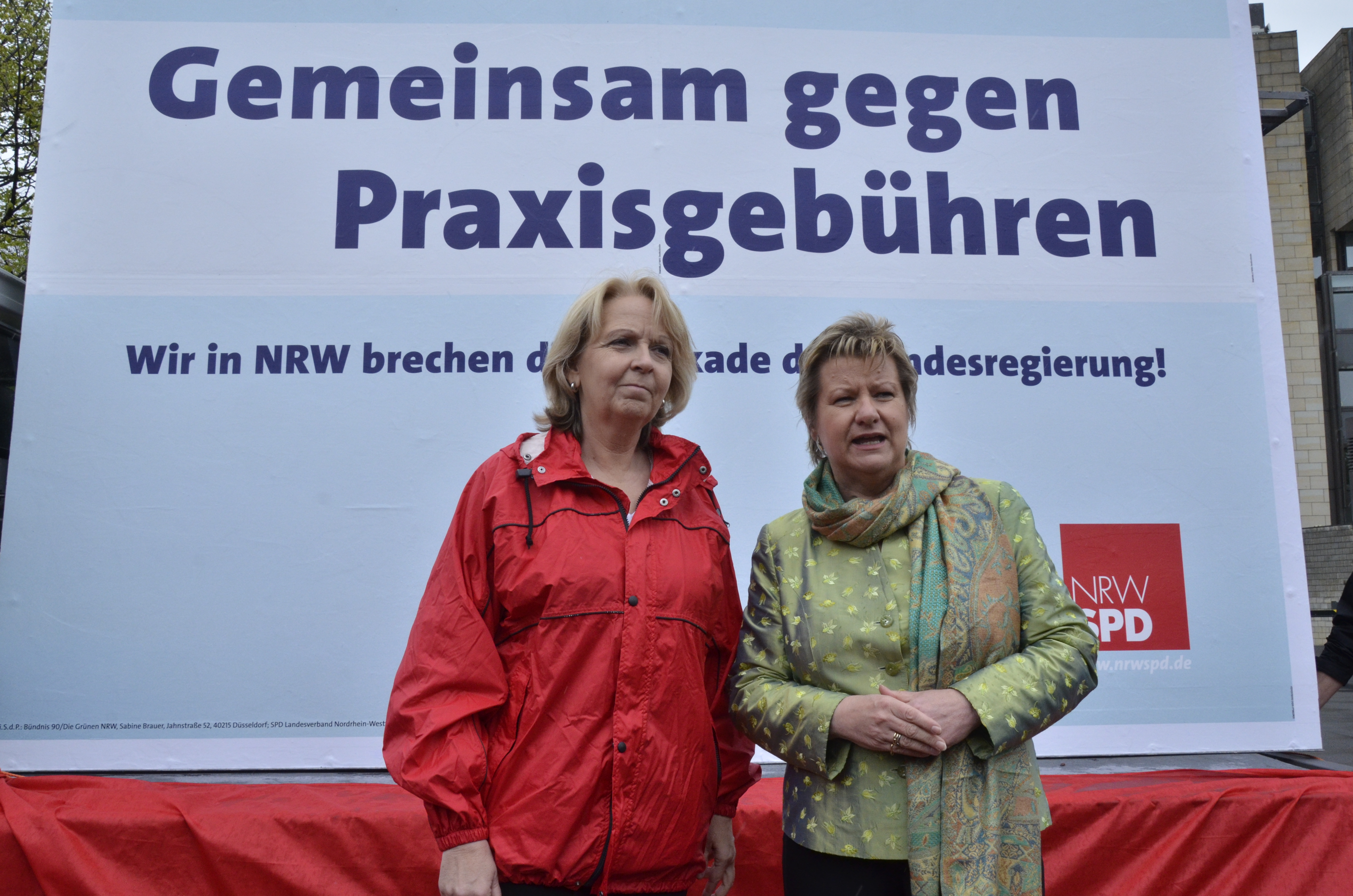 Hannelore Kraft und Sylvia Löhrmann im NRW-Landtagswahlkampf 2012